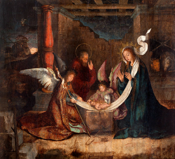 Natividade por um seguidor de Vasco Fernandes da Igreja de São Miguel de Freixo de Espada à Cinta.